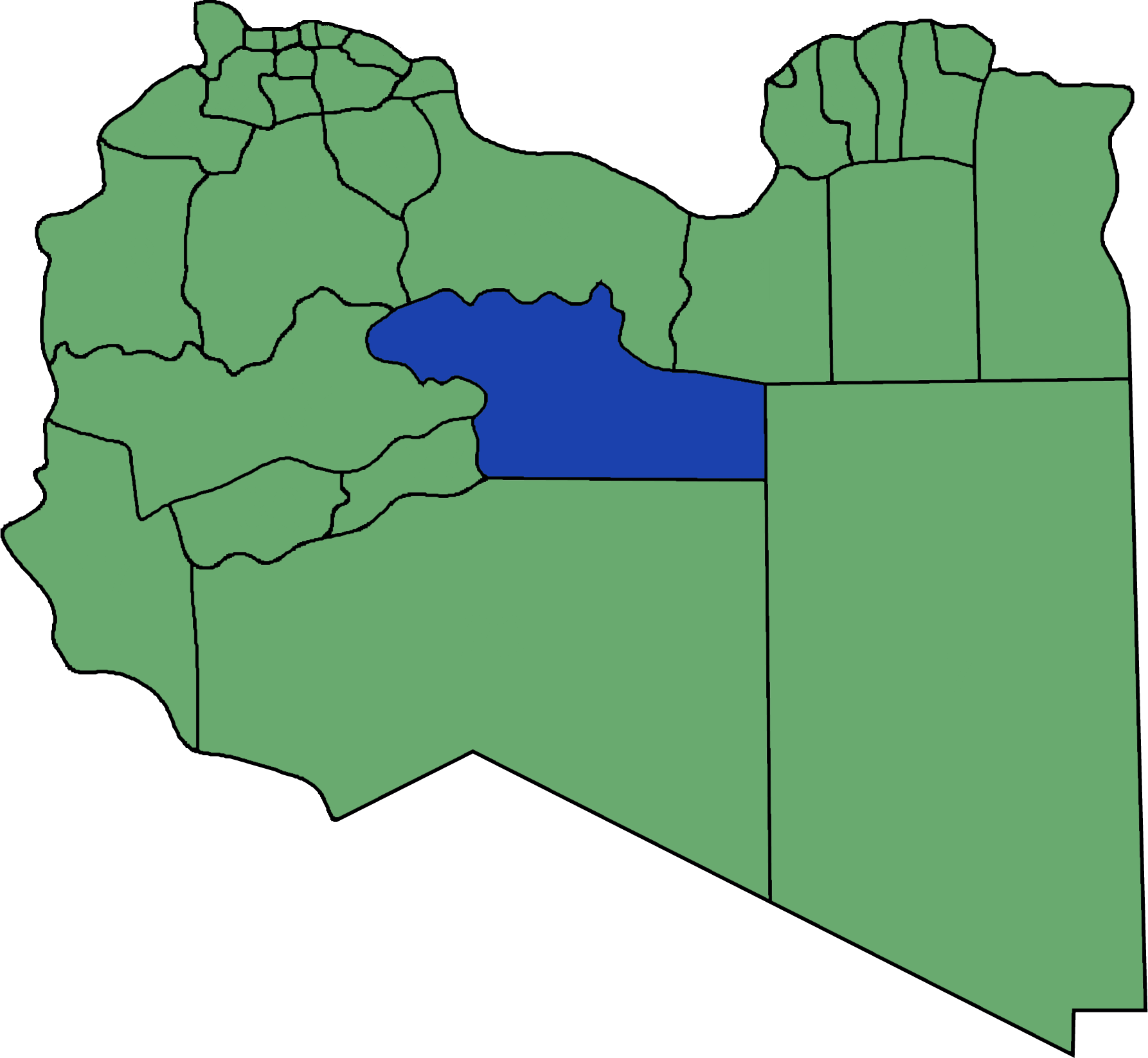 Die neuen Gemeinden (Munizipien) in Libyen. Al Jufrah hervorgehoben.